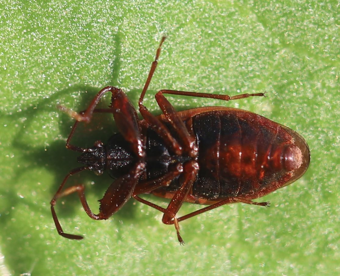 Kiefernzapfenwanze (Gastrodes grossipes), Ventralansicht; 8. August 2020, Totfund an Tabak